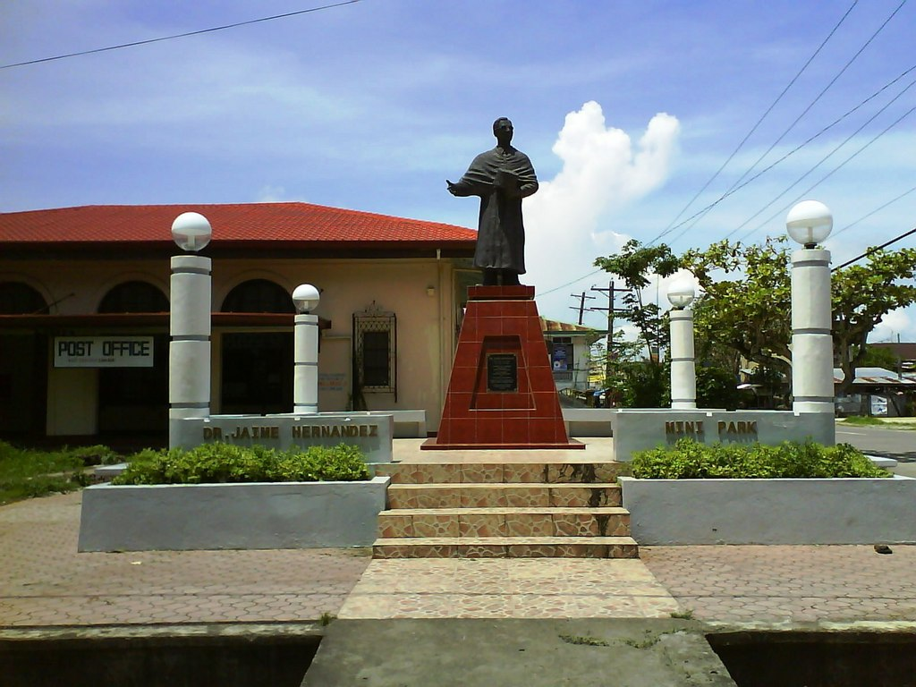 Libmanan, Camarines Sur, Philippines